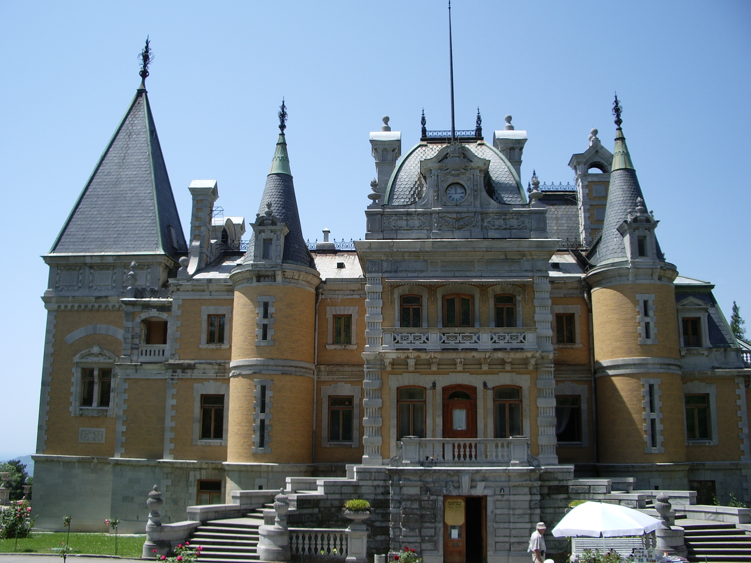 Вид сзади. Массандровский дворец. Ялтинский горсовет. Крым. Июнь 2009